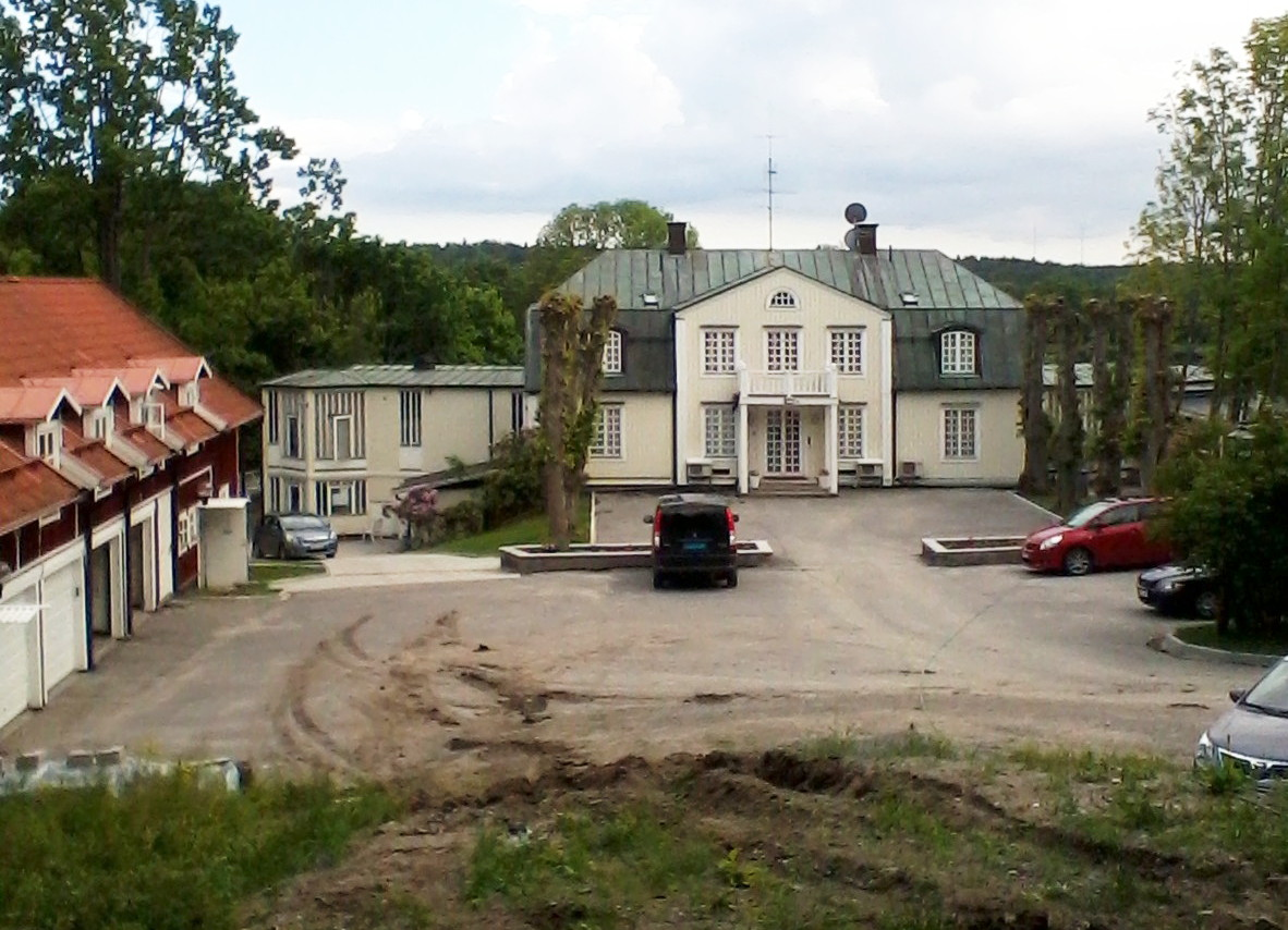 Irans ambassad på Lidingö